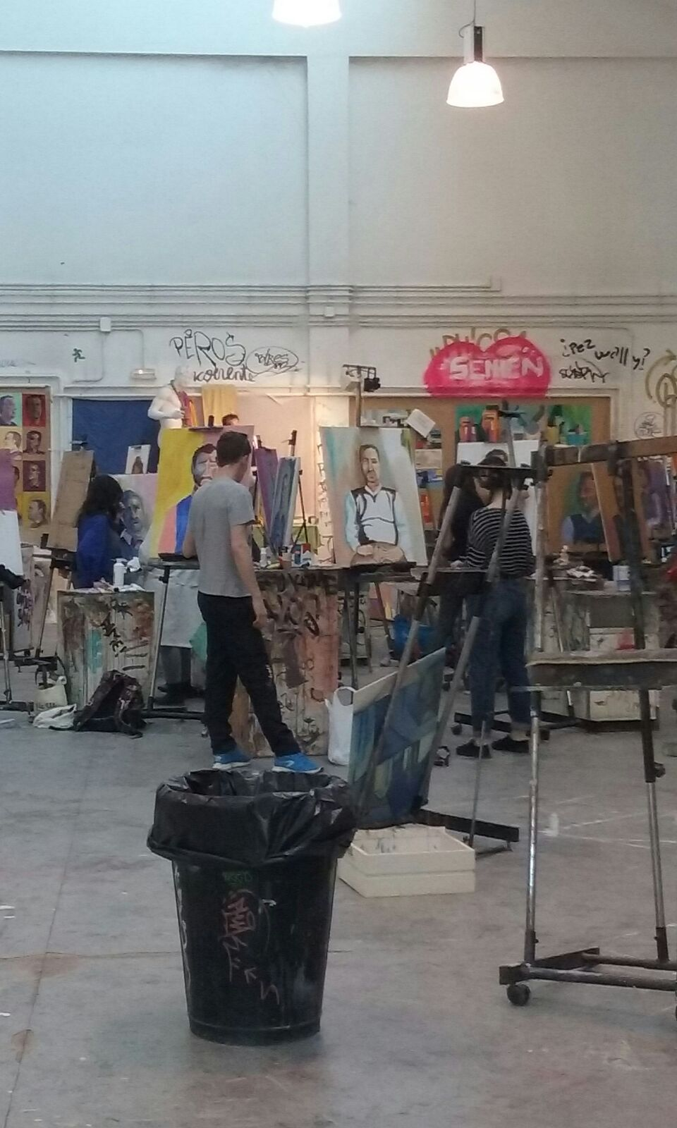 alumnos en una clase de Bellas artes (2016)